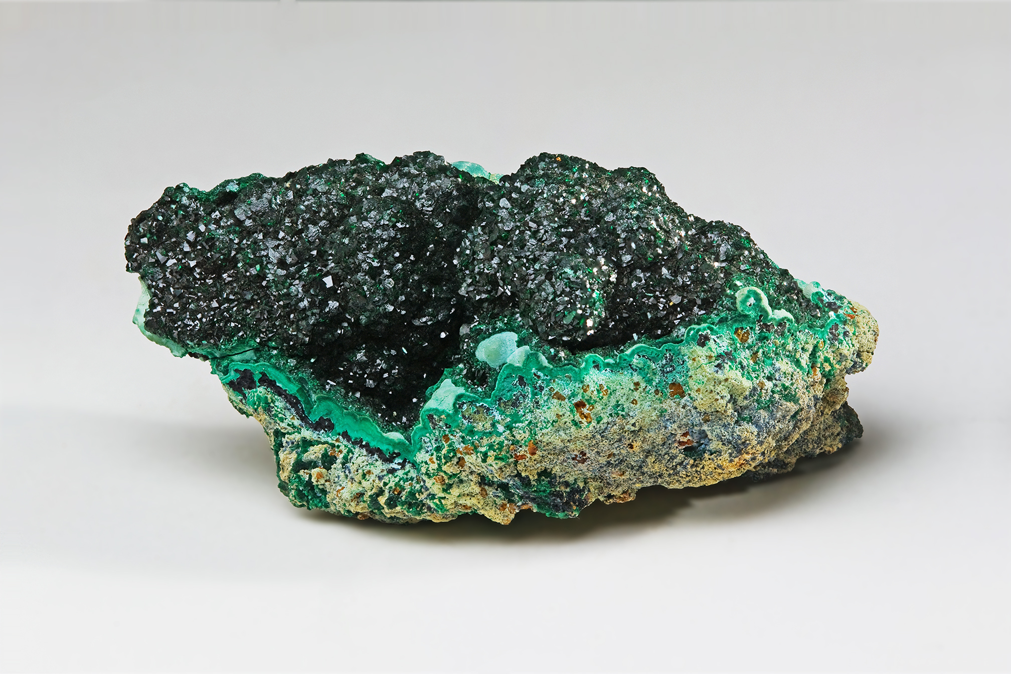 من، صاحب حقوق قانونی این اثر، به این وسیله این اثر را تحث اجازه‌نامه‌های ذیل منتشر می‌کنم: اجازهٔ کپی، پخش و/یا تغییر این سند تحت شرایط 'مجوز مستندات آزاد گنو نسخهٔ ۱٫۲، تنها به همان شکل که توسط بنیاد نرم‌افزار آزاد منتشر شده؛ بدون بخش‌های ناوردا (نامتغیر)، متون روی جلد، و متون پشت جلد، اعطا می‌شود. یک کپی از مجوز در بخشی تحت عنوان مجوز مستندات آزاد گنو ضمیمه شده است.فقط ۱٫۲ این پرونده با اجازه‌نامهٔ کریتیو کامانز Attribution-Share Alike 3.0 سازگار نشده منتشر شده‌است. شما اجازه دارید: برای به اشتراک‌گذاشتن – برای کپی، توزیع و انتقال اثر تلفیق کردن – برای انطباق اثر تحت شرایط زیر: تخصیص – شما باید اثر را به نحوی که توسط مؤلف یا مجوزدهنده مشخص شده، نسبت دهید (اما نه به نحوی که وانمود شود که آن‌ها شما یا استفادهٔ شما از اثر را حمایت کرده‌اند). سهم یکسان – اگر در این اثر تغییر، تبدیل، یا ساخت بر پایه‌اش انجام دهید، می‌توانید اثر بدست‌آمده را تنها تحت مجوز یکسان یا مشابه با این توزیع کنید. می‌توانید مجوز دلخواه خود را برگزینید. Malachite, Zaire